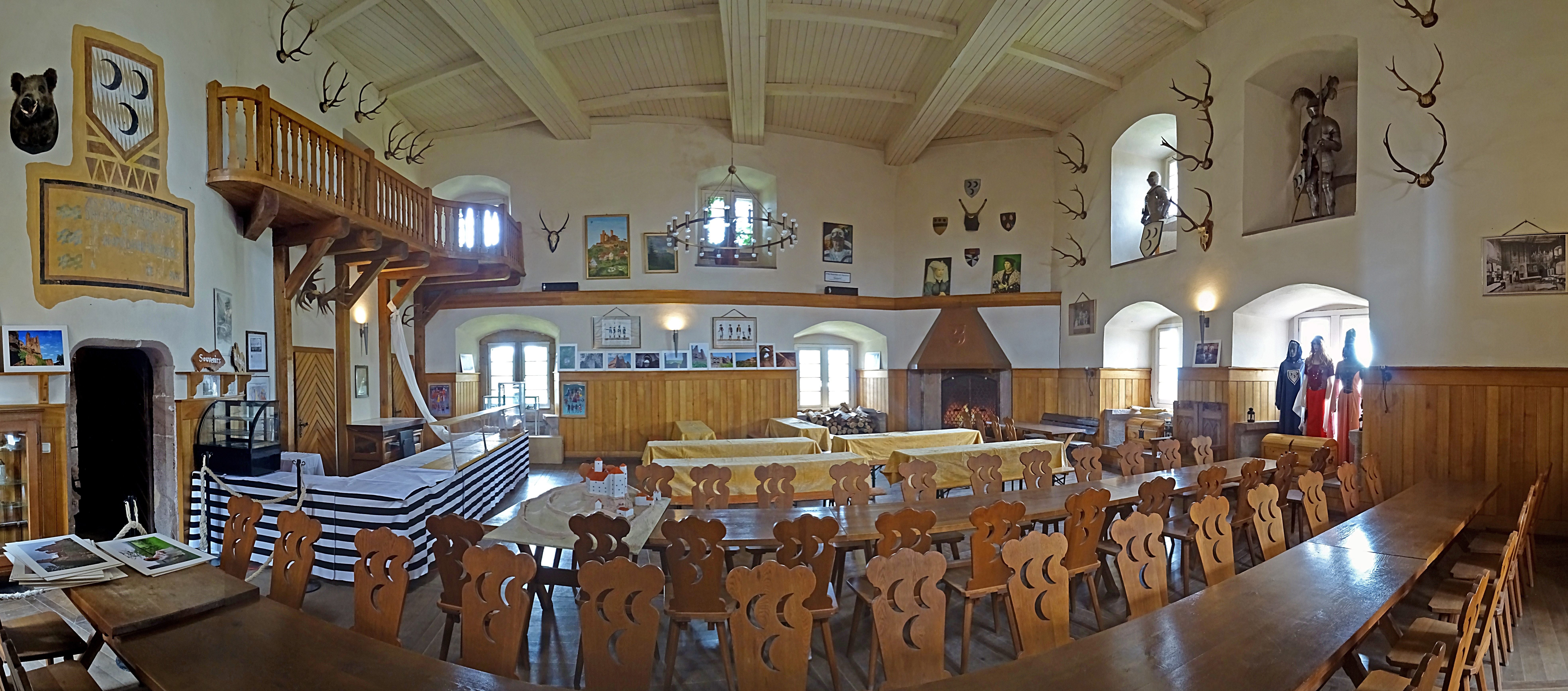 Rittersaal in der Burgruine Hanstein